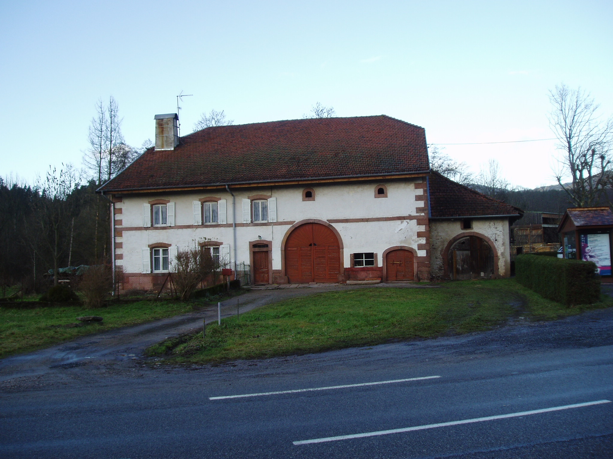 Ferme des Vosges gréseuses à demi-croupe, vallée de la Meurthe.